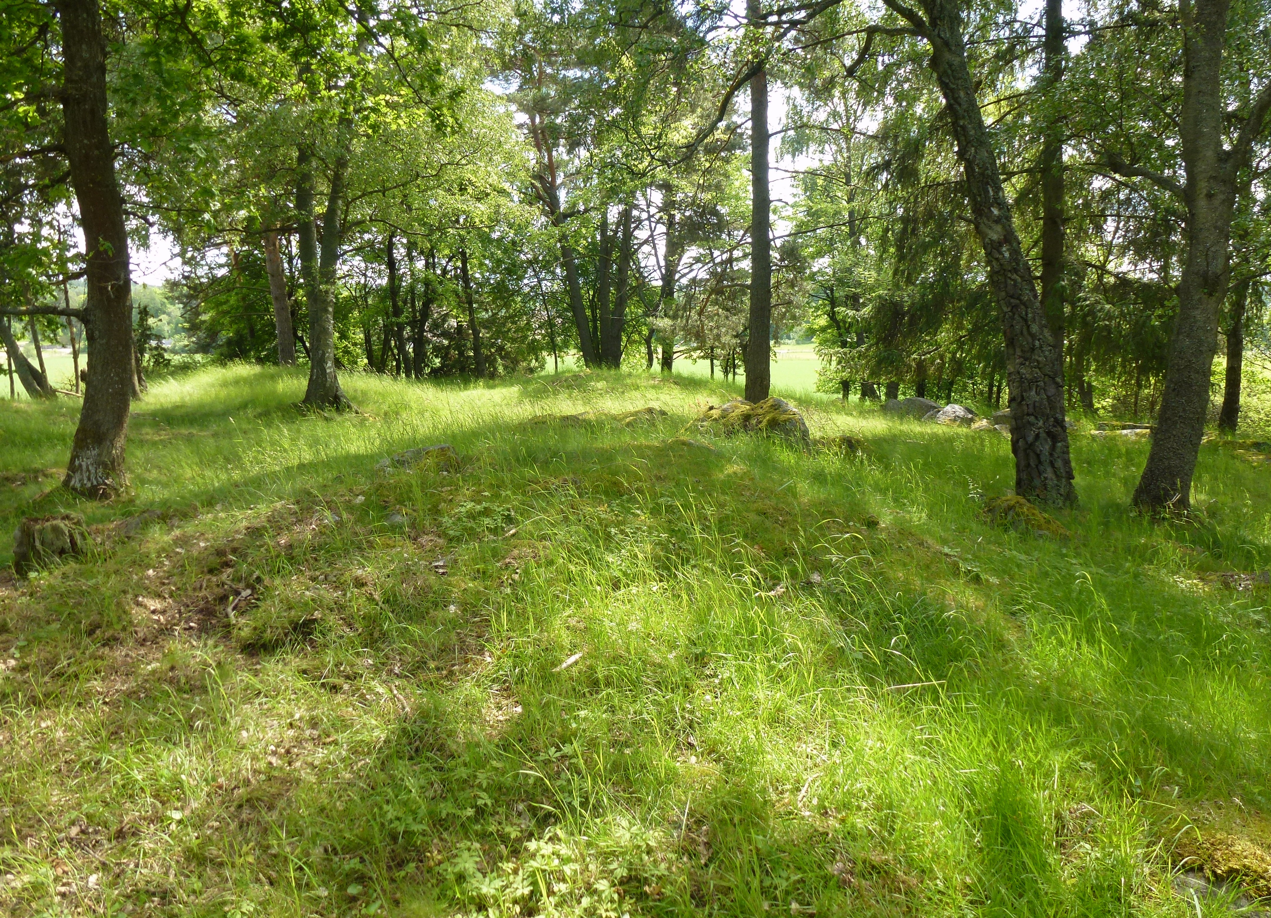 Kyrkkulla gravfält vid Hågelby gård (RAÄ-nummer Botkyrka 104:1)